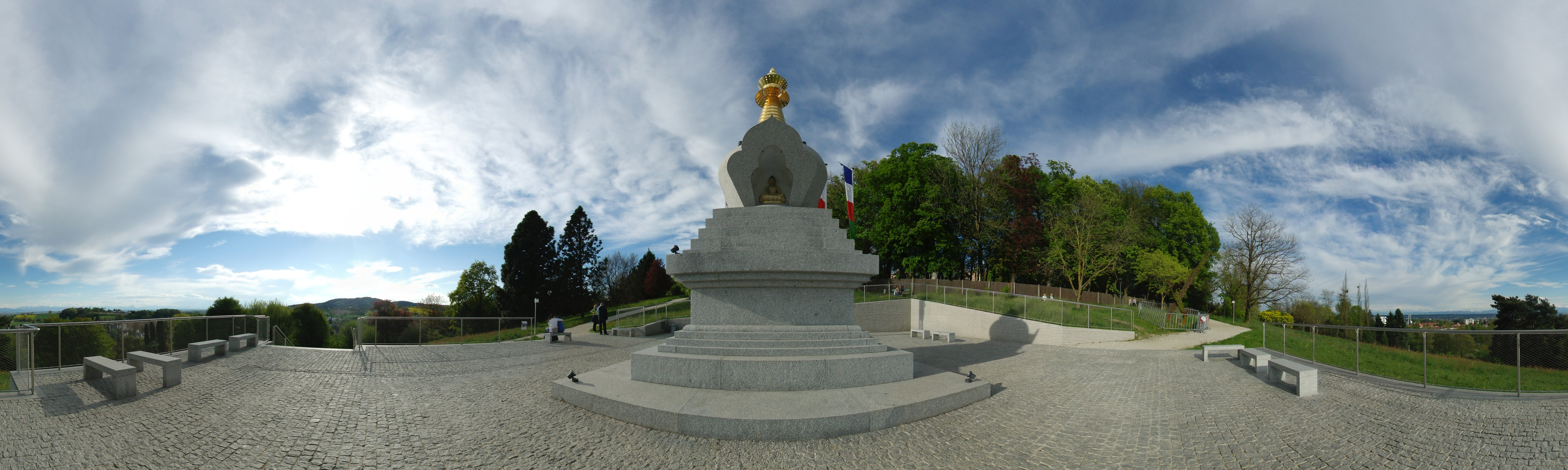 Panorama Stupa Linz